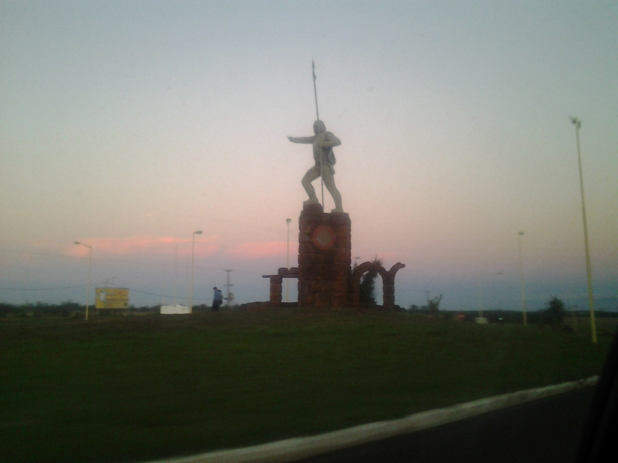 Monumento a Andrés Guacurarí, en Santo Tomé, Corrientes, en la zona del Puente de la Integración.